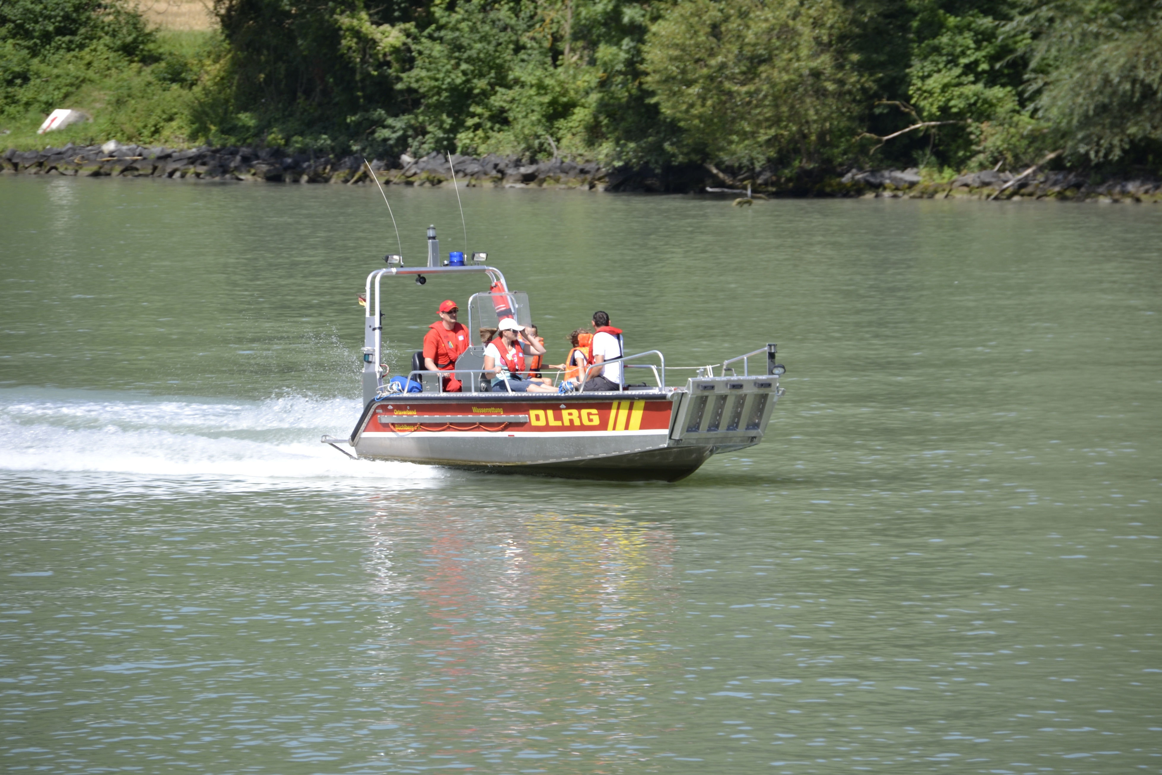 Deutsche Lebens-Rettungs-Gesellschaft-Rettungsboot auf der Donau.